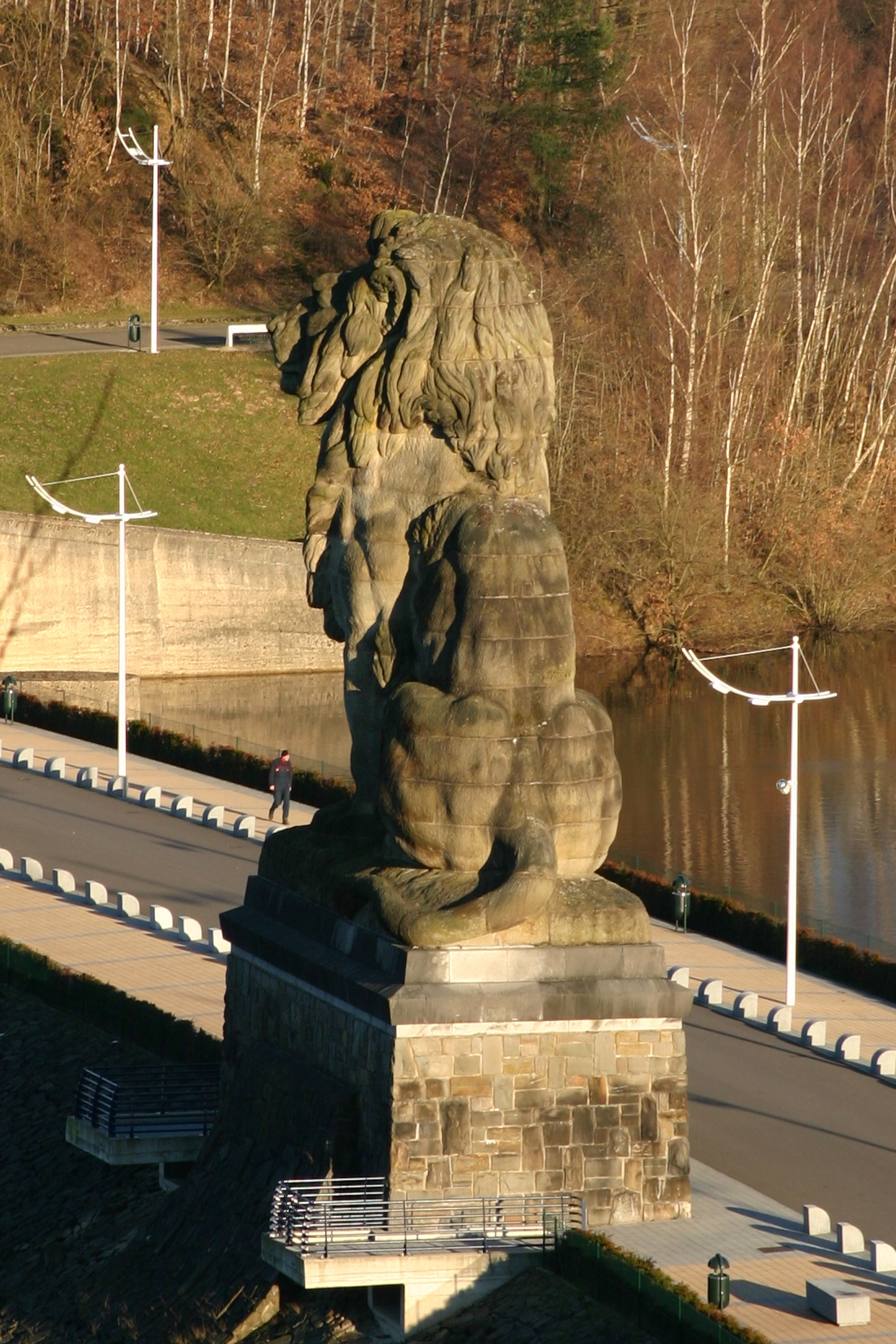 De Léiw op der Kroun vum Staudamm vun der Gileppe.